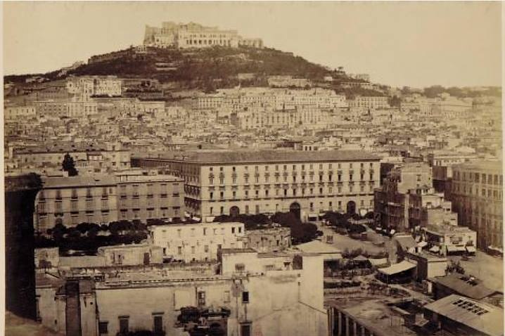 Napoli, Piazza Municipio prima dell'abbattimento dei bastioni spagnoli. Autore sconosciuto.